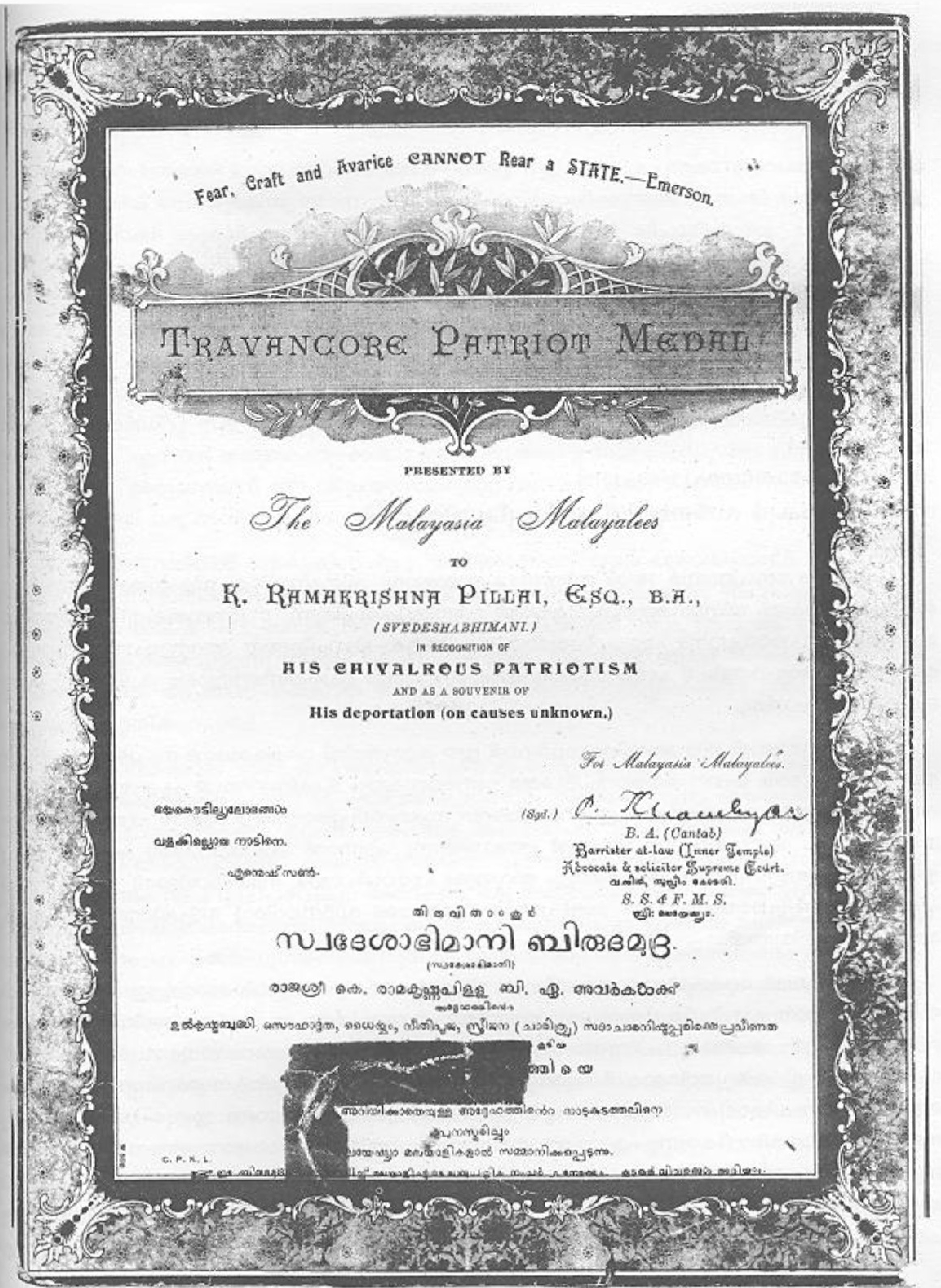 നാടുകടത്തപ്പെട്ട സ്വദേശാഭിമാനിക്ക് മലേഷ്യാമലയാളികൾ സമർപ്പിച്ച സ്വദേശാഭിമാനി ബിരുദമുദ്ര